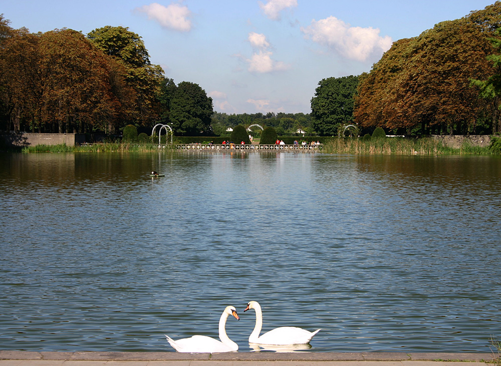 Blücherpark Cologne, Germany. author: Elke Wetzig (elya) date: 2005-09-18